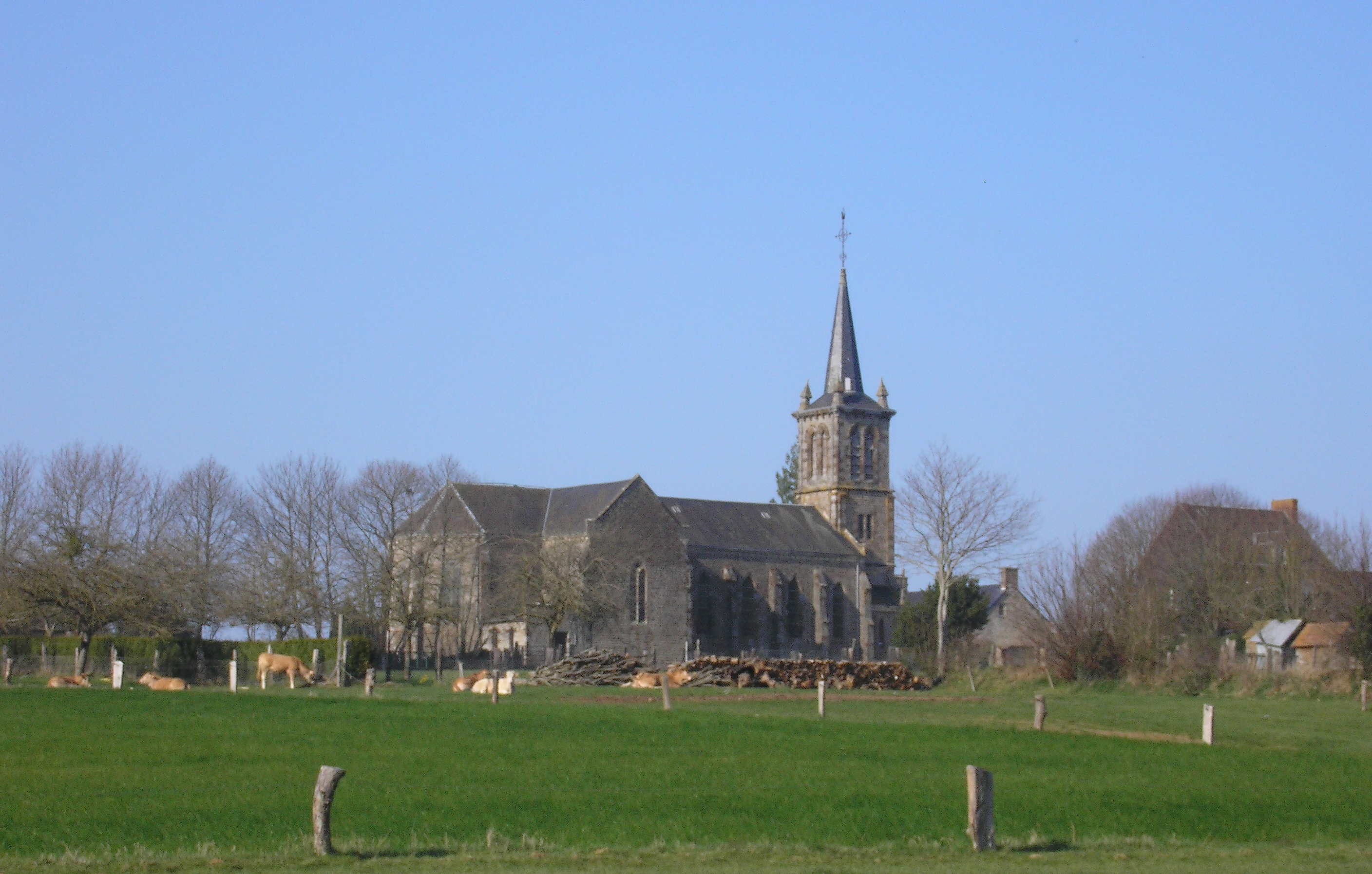 L'Épinay-le-Comte (Normandie, France). L'église Saint-Céneri.